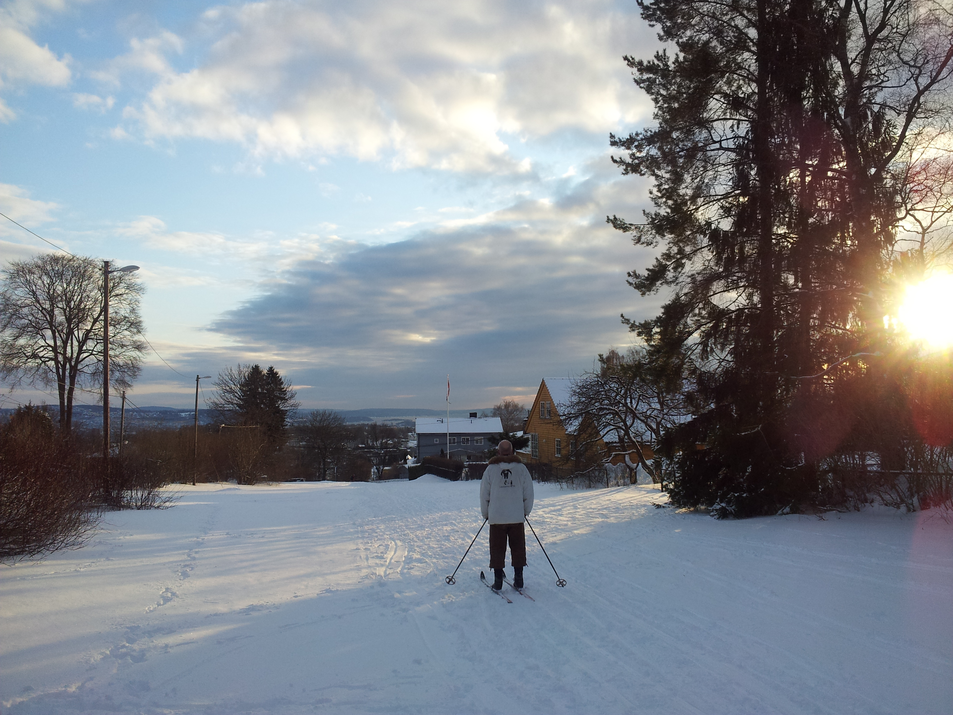 Damefallet om vinteren, 2012.